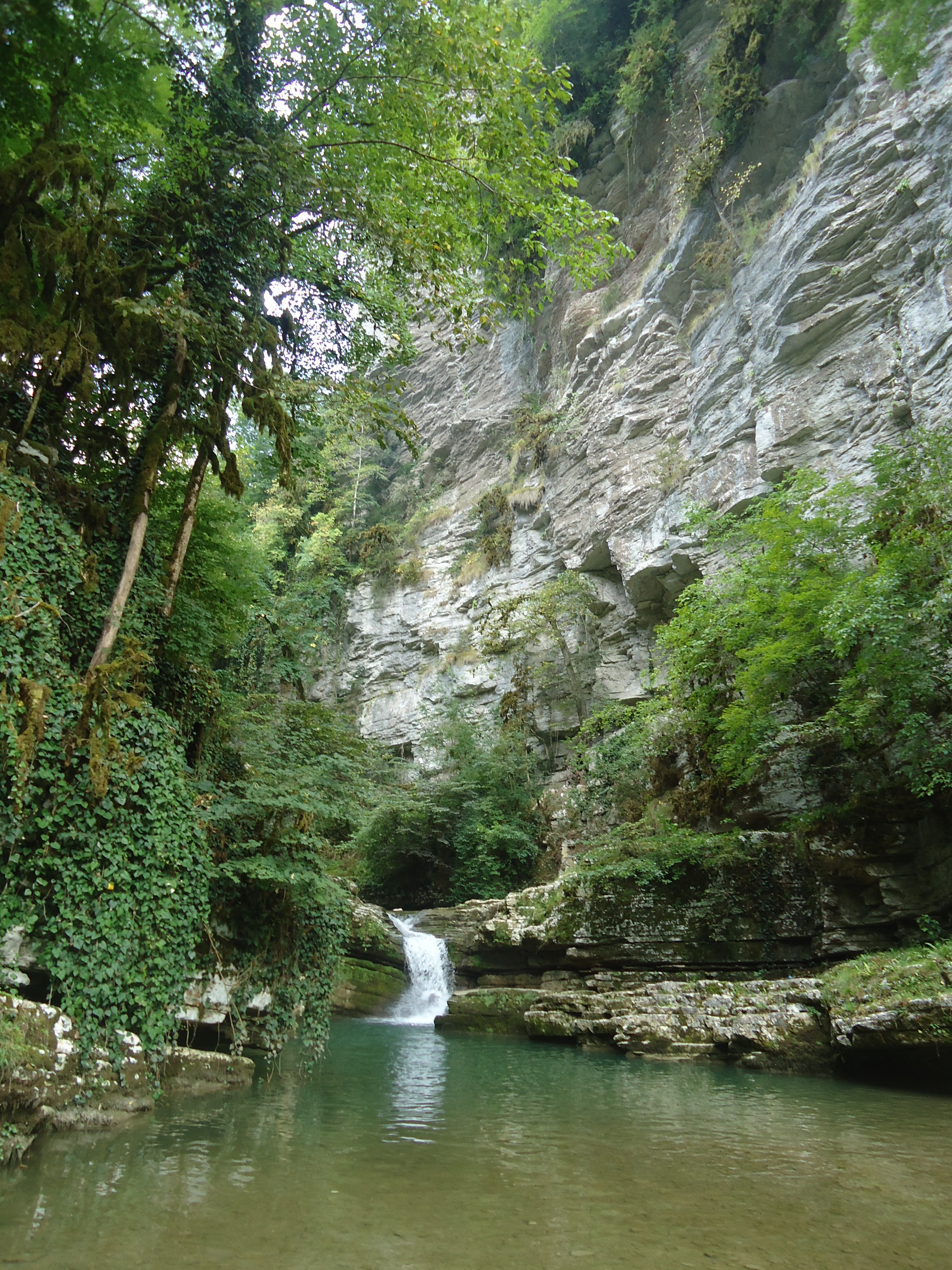 Каньон реки Псахо в Адлерском районе города Сочи